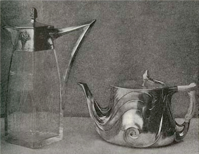 Weinkaraffe aus Glas und Silber von C. Ehrentraut und Teekanne aus Silber Franz Barwig / von Alfred Pollak hergestellt. Abbildung aus Seite 47 der „The first International Exhibition of modern decorative art at Turin“ in Studio Vol. 26 (1902) S.45-52, : Sp Coll P.A.A. f200